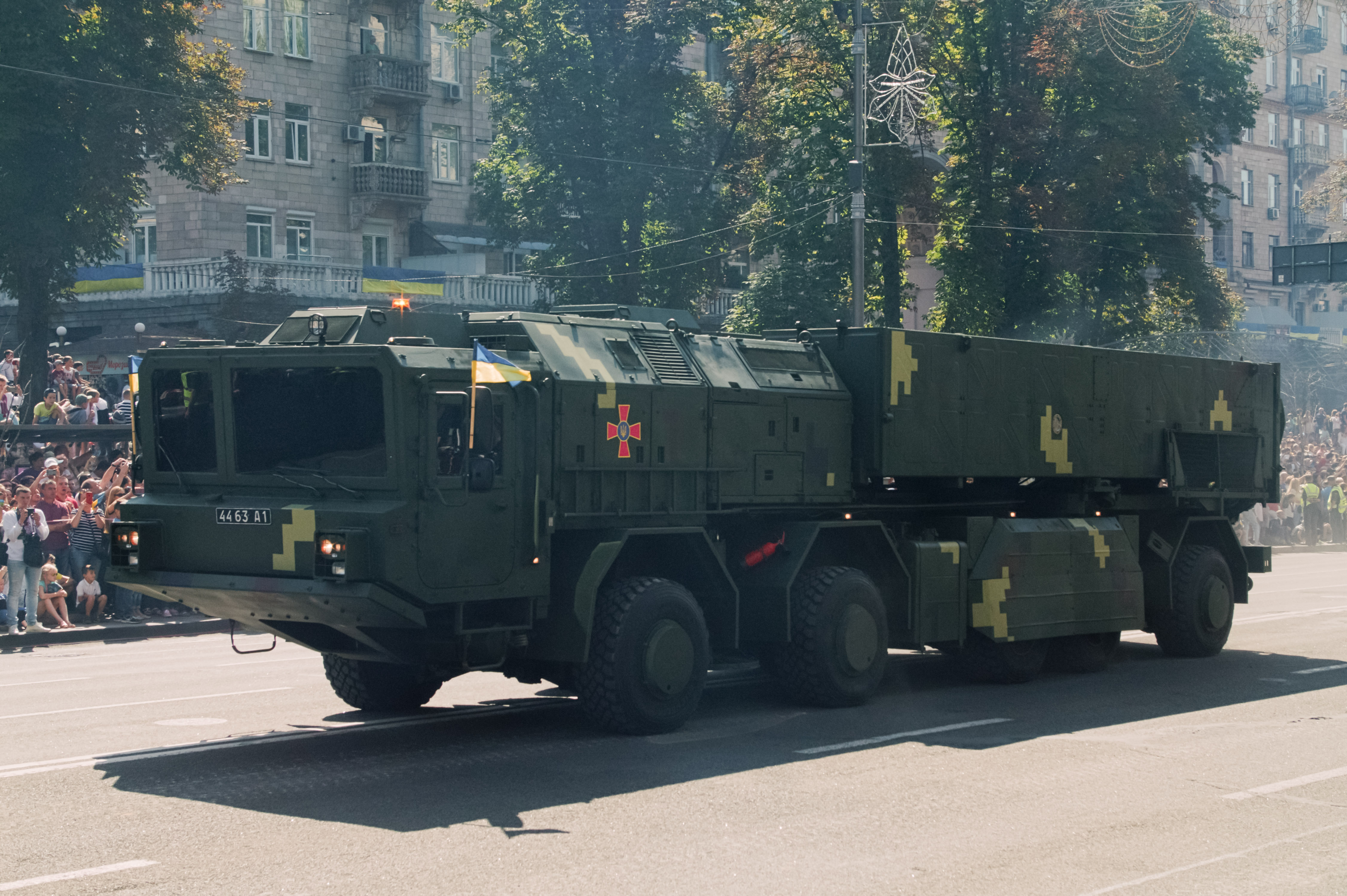 Военный парад в честь Дня Независимости Украины / Military parade in honor of the Independence Day of Ukraine